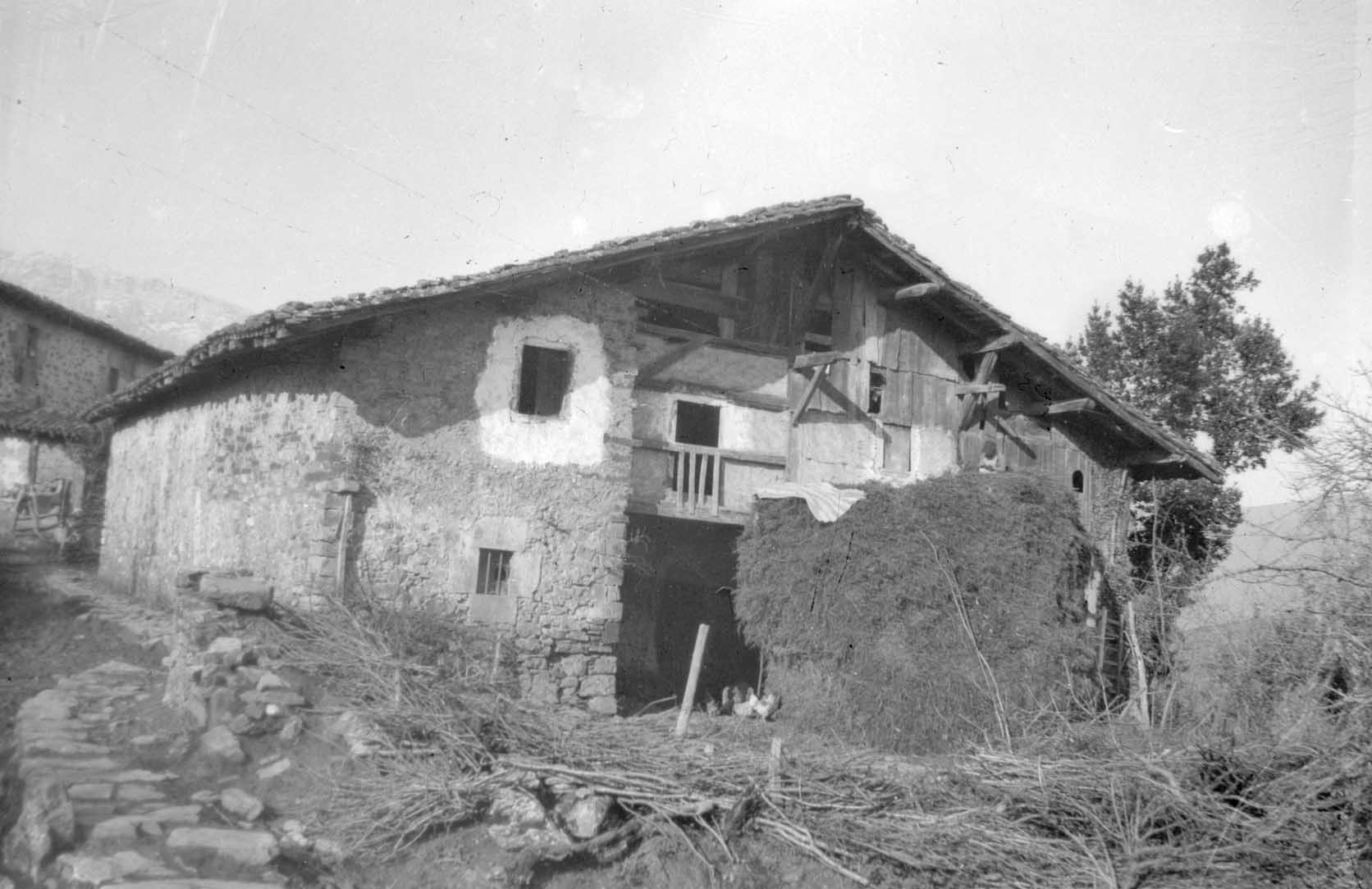 Salturri baserria (Azkoaga, Aramaio, Araba) 1949an